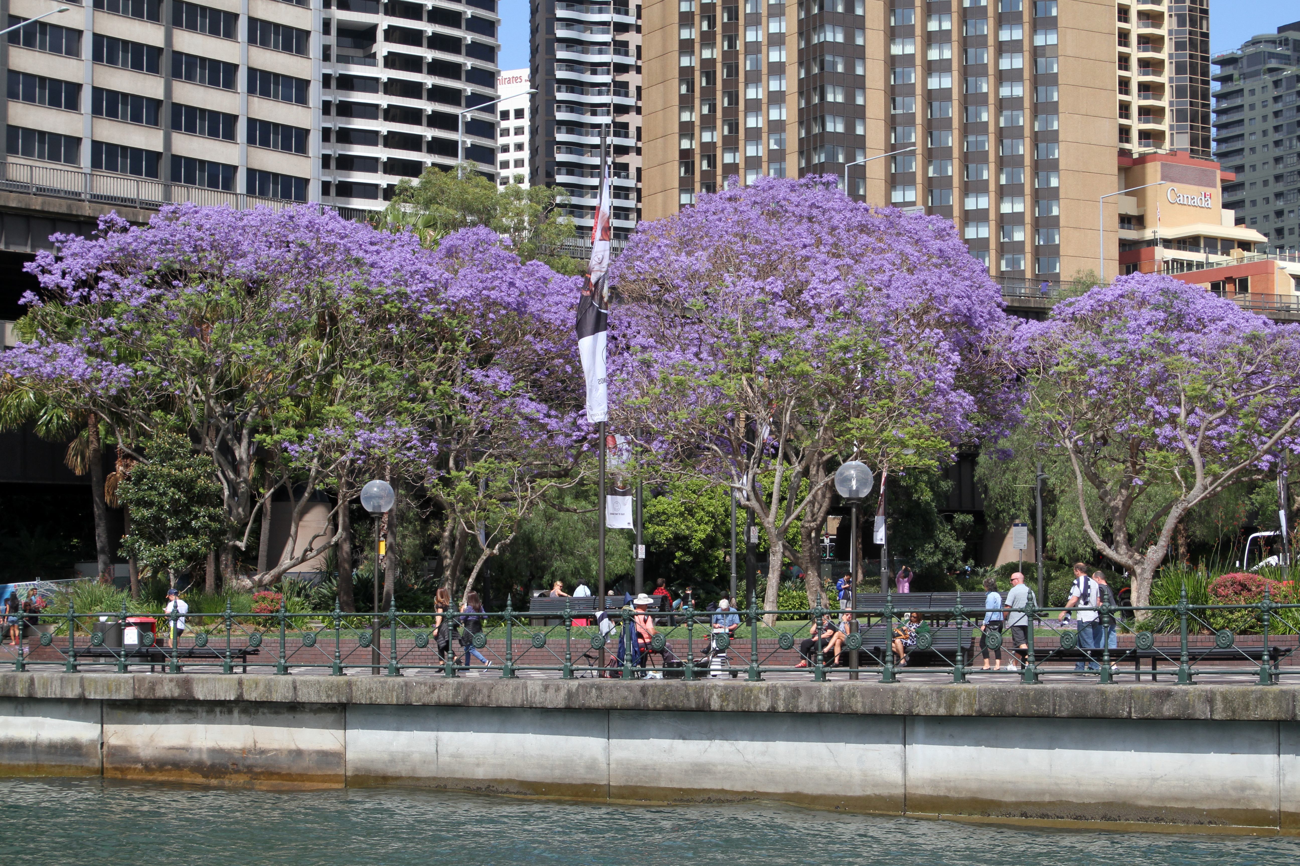 Jacaranda Trees